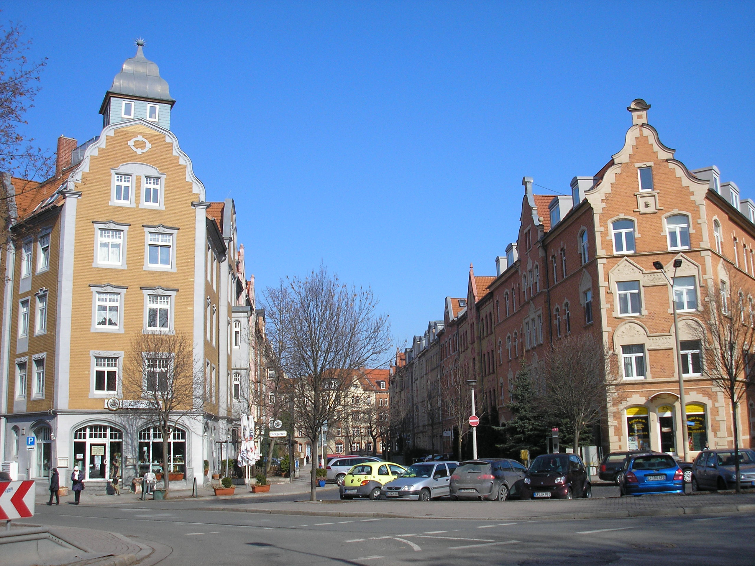 Blick in den Waidmühlenweg in Erfurt.